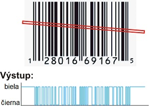 čítanie čiarového kódu